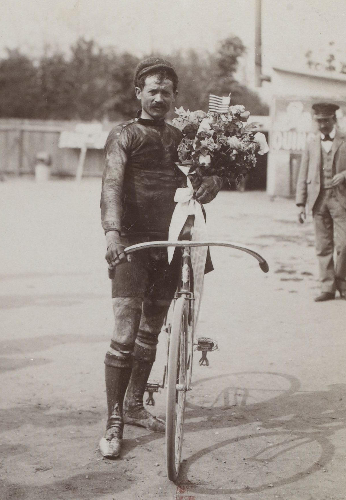 [Collection Jules Beau. Photographie sportive] : T. 15. Année 1901 / Jules Beau : F. 27v. Course Bordeaux - Paris, 5 mai 1901